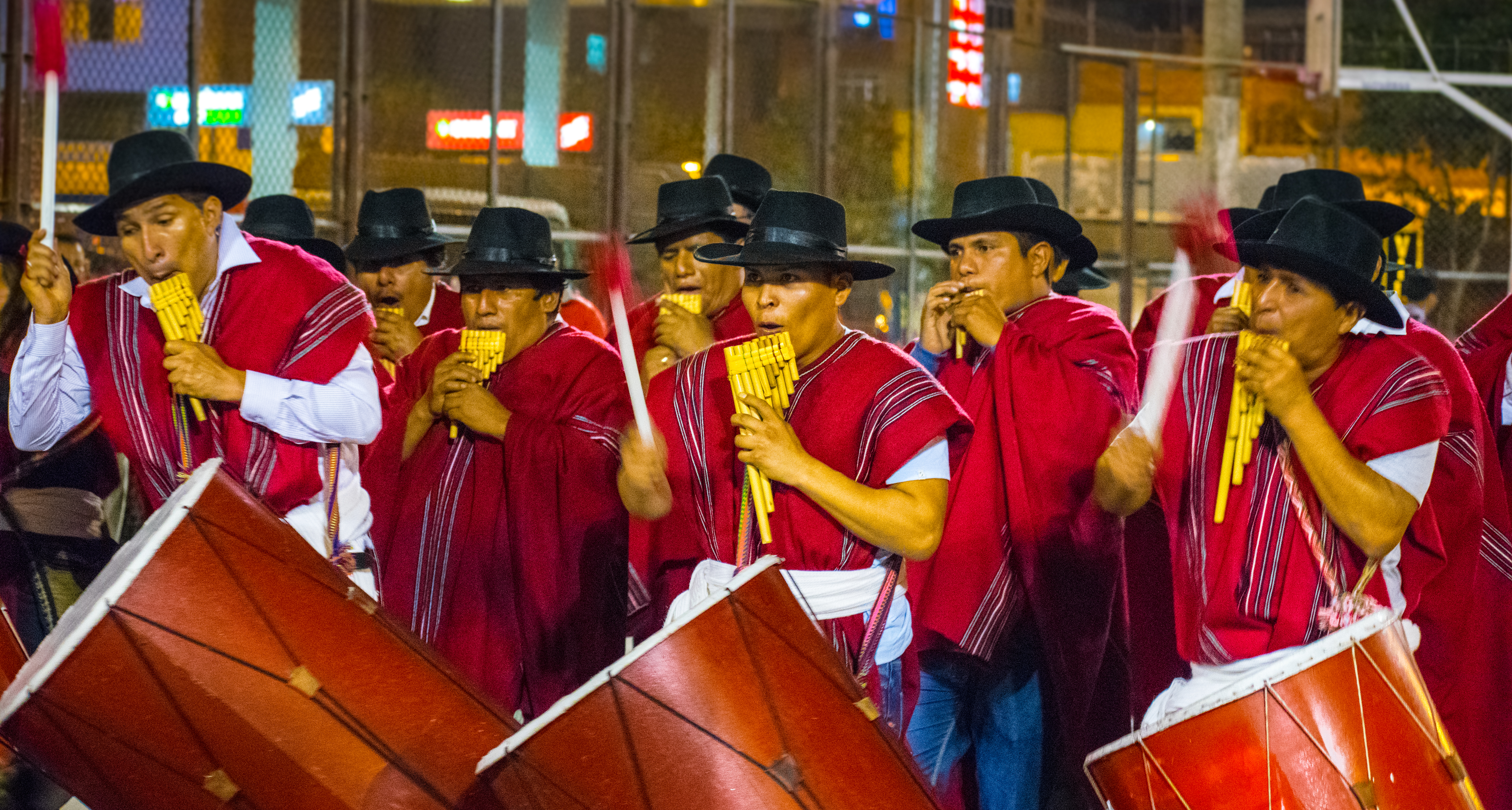 XIV Encuentro de Sikuris y Sikumorenos INKARI, es organizado por la Confraternidad de Sikuris y Sikumorenos con el fin de impulsar y difundir este arte milenario que es el Sikuri en sus diferentes expresiones. Este Encuentro se realizo los días 02,03 y 04 de Junio del 2017 en San Martin de Porres